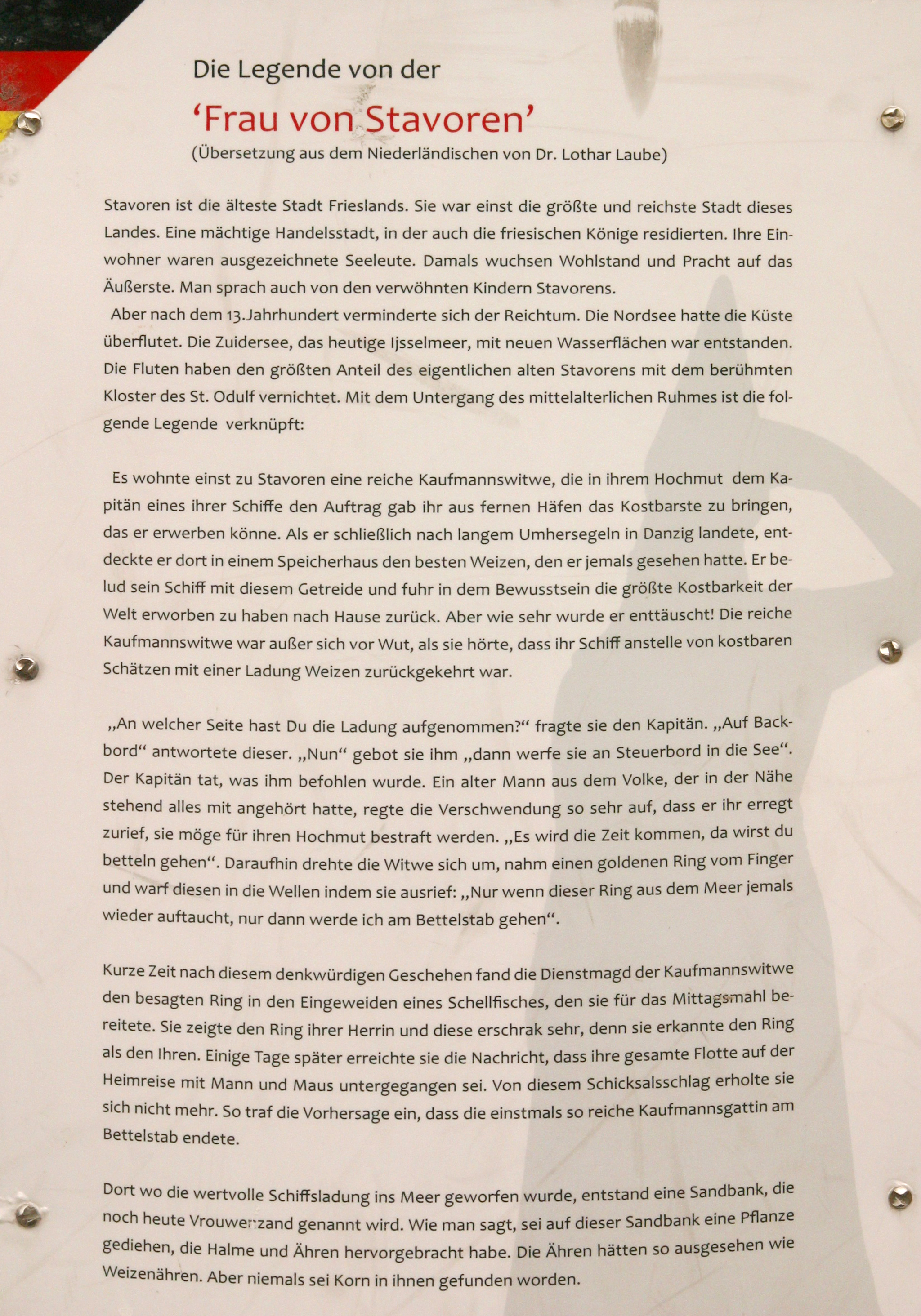 Die "Vrouwe von Stavoren" (Frau von Stavoren) ist eine wichtige Figur in der Sage über die Geschichte des Ortes Stavoren. Auf dem Foto ist die Statur "Vrouwe von Stavoren" im Hafen von Stavoren in einem Detail (Texttafel in Deutsch) zu sehen.